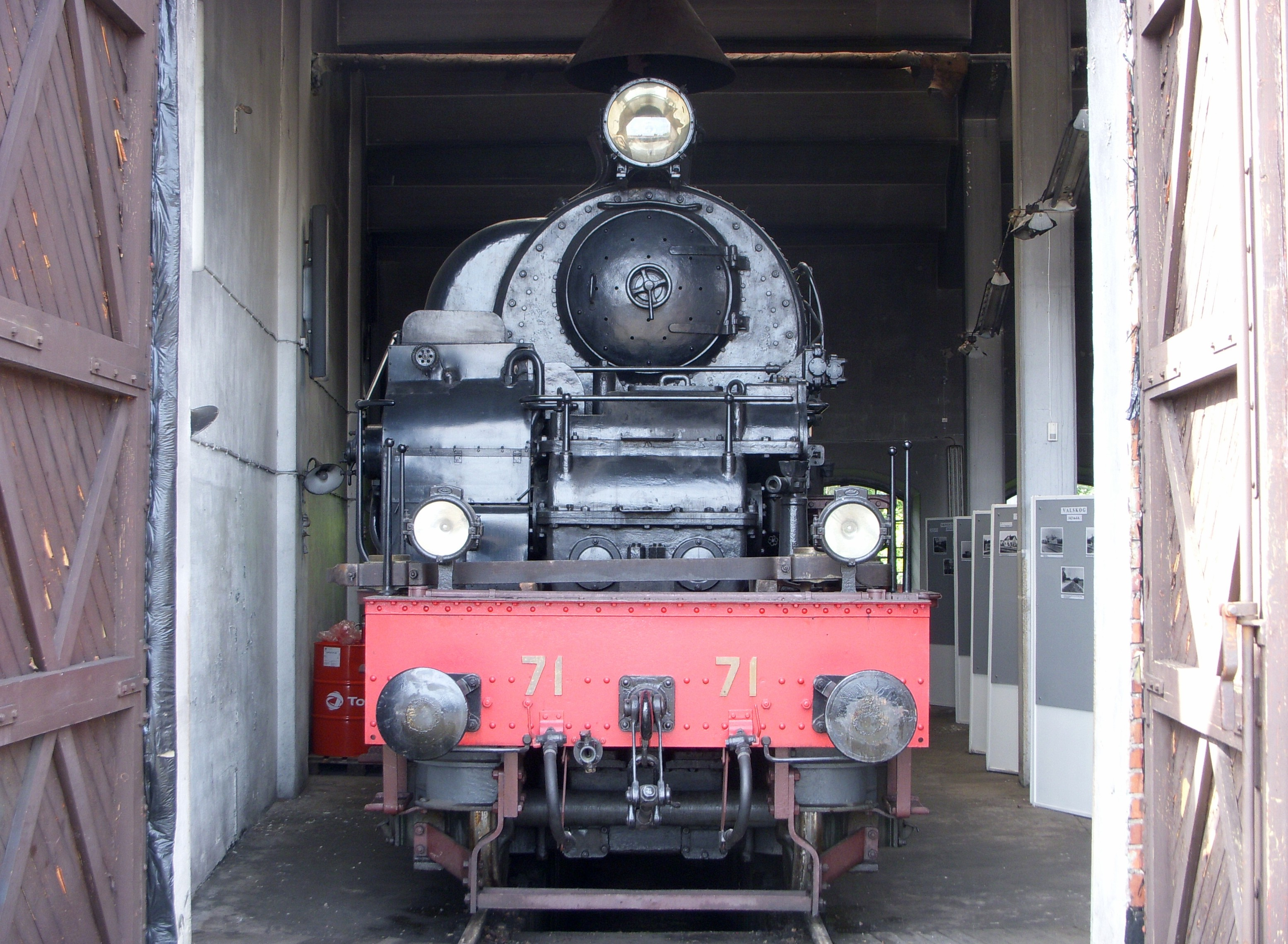 Lokmuseet i Grängesberg, turbinloket M3t nr 71